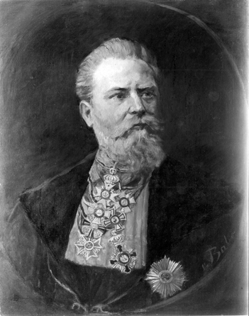 Gustav von Schönberg; Gemälde der Professorengalerie der Eberhard Karls Universität Tübingen